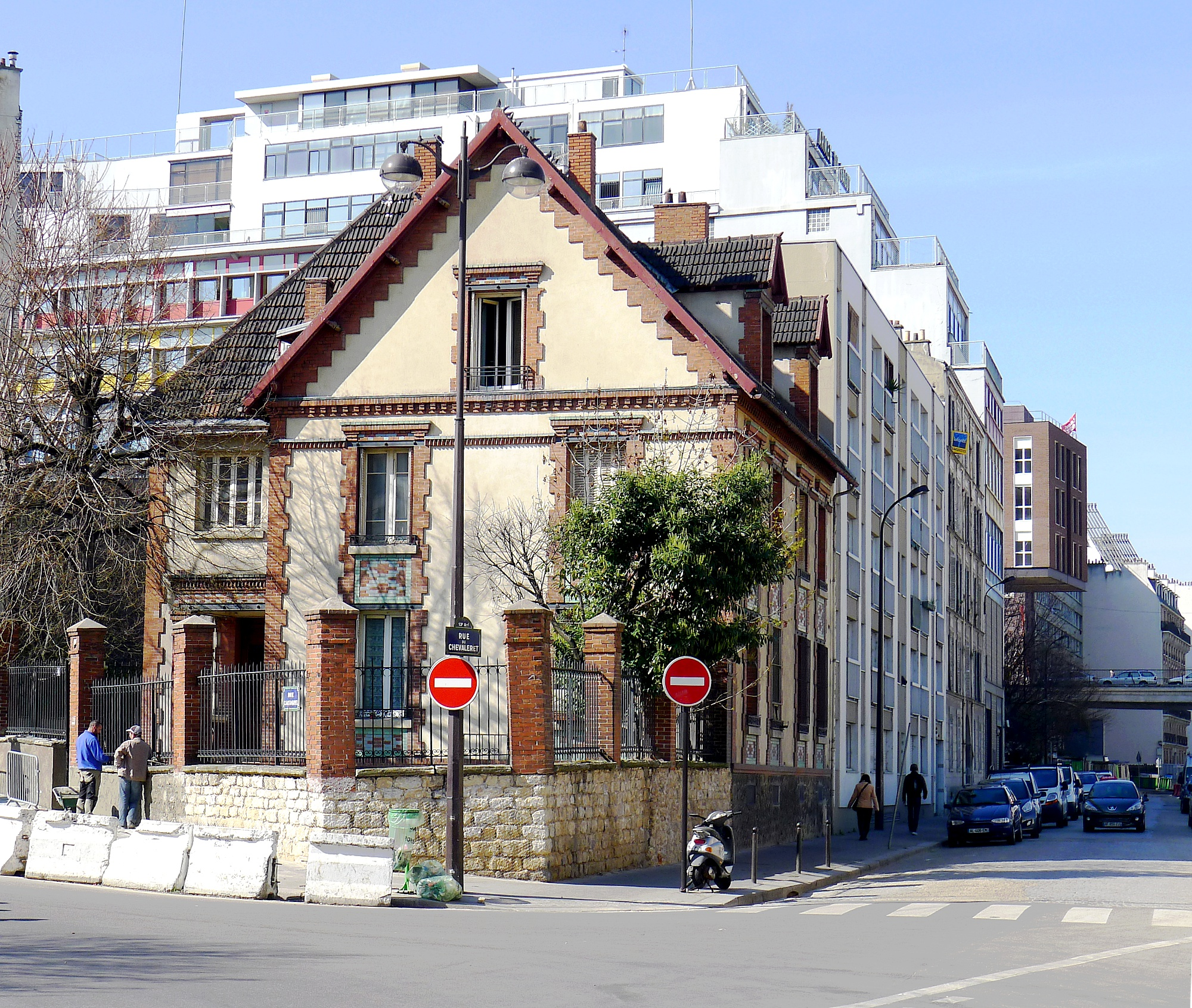 Angle des rues du Chevaleret et Cantagrel - Paris XIII